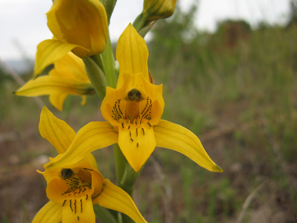 Orquídea (Chloraea gavilu)